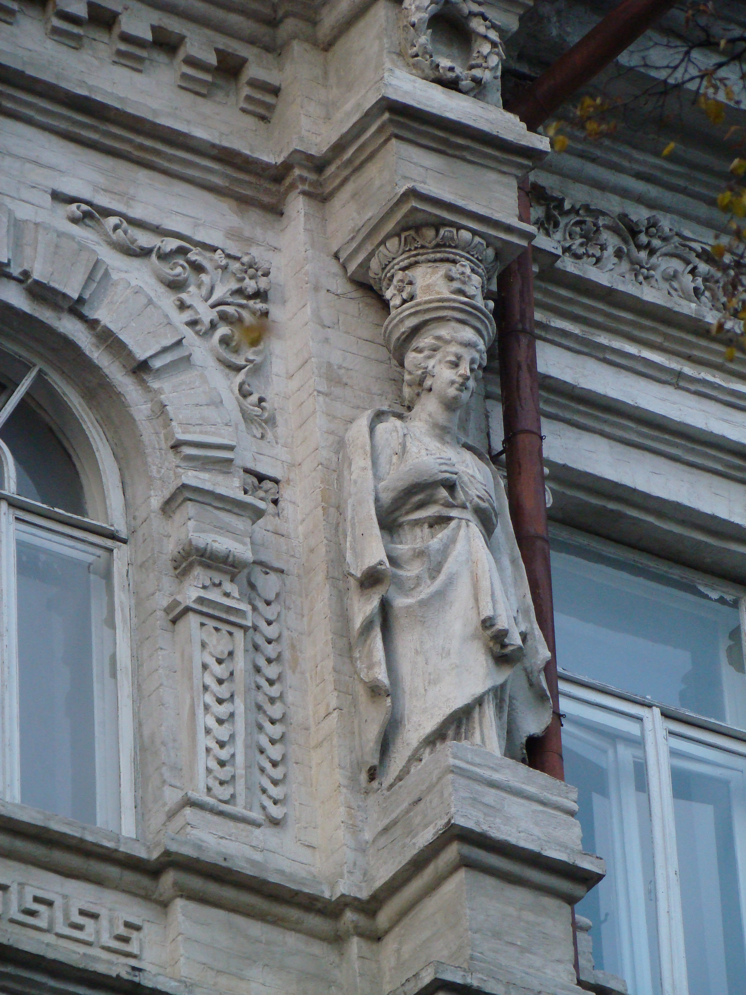 Будинок прибутковий, Київ, Чапаєва вул., 4